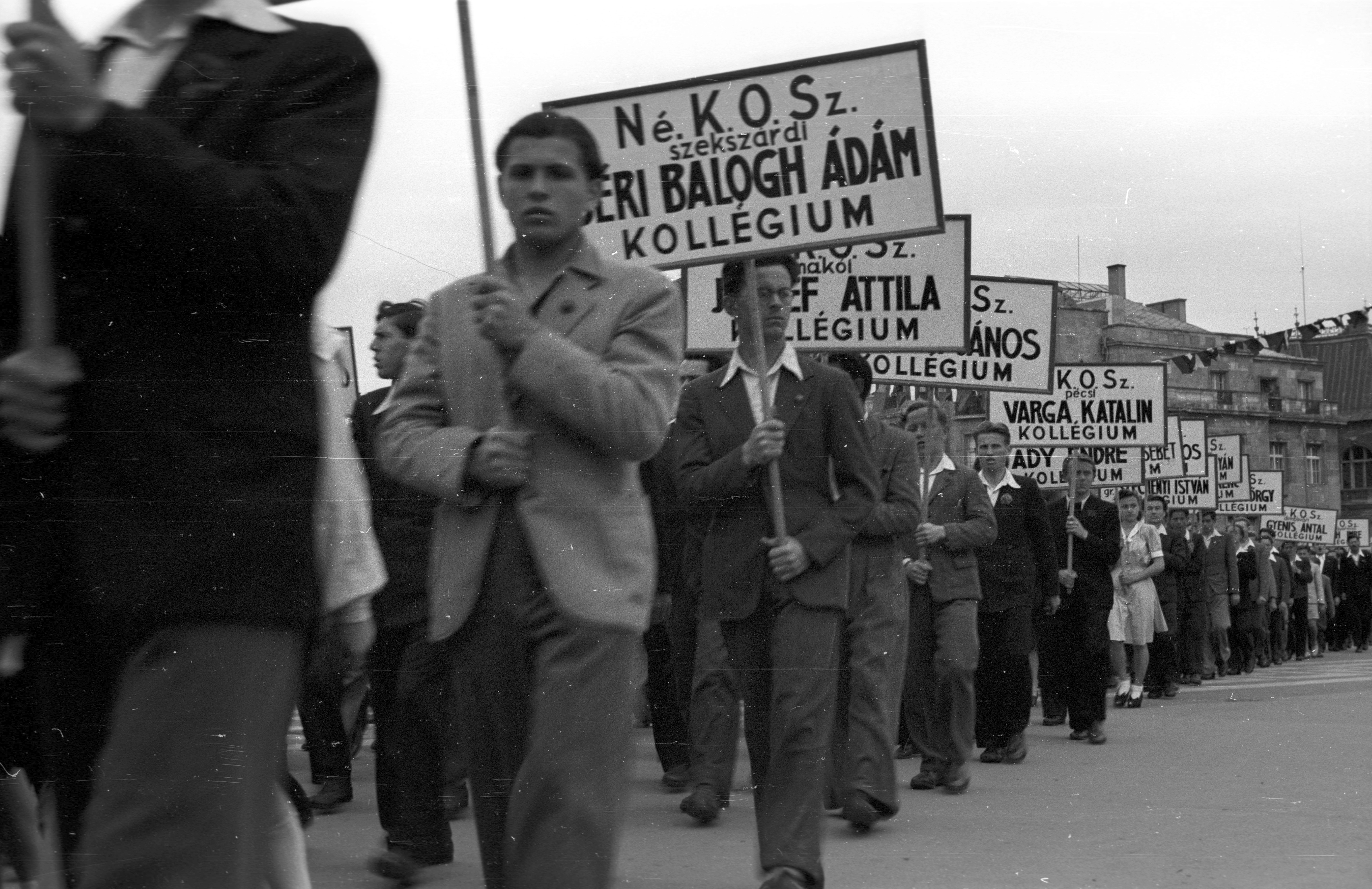 NÉKOSZ felonulók 1947. május elsején Budapest, Hősök tere, jobbra az Andrássy út torkolata, május 1-i ünnepség.